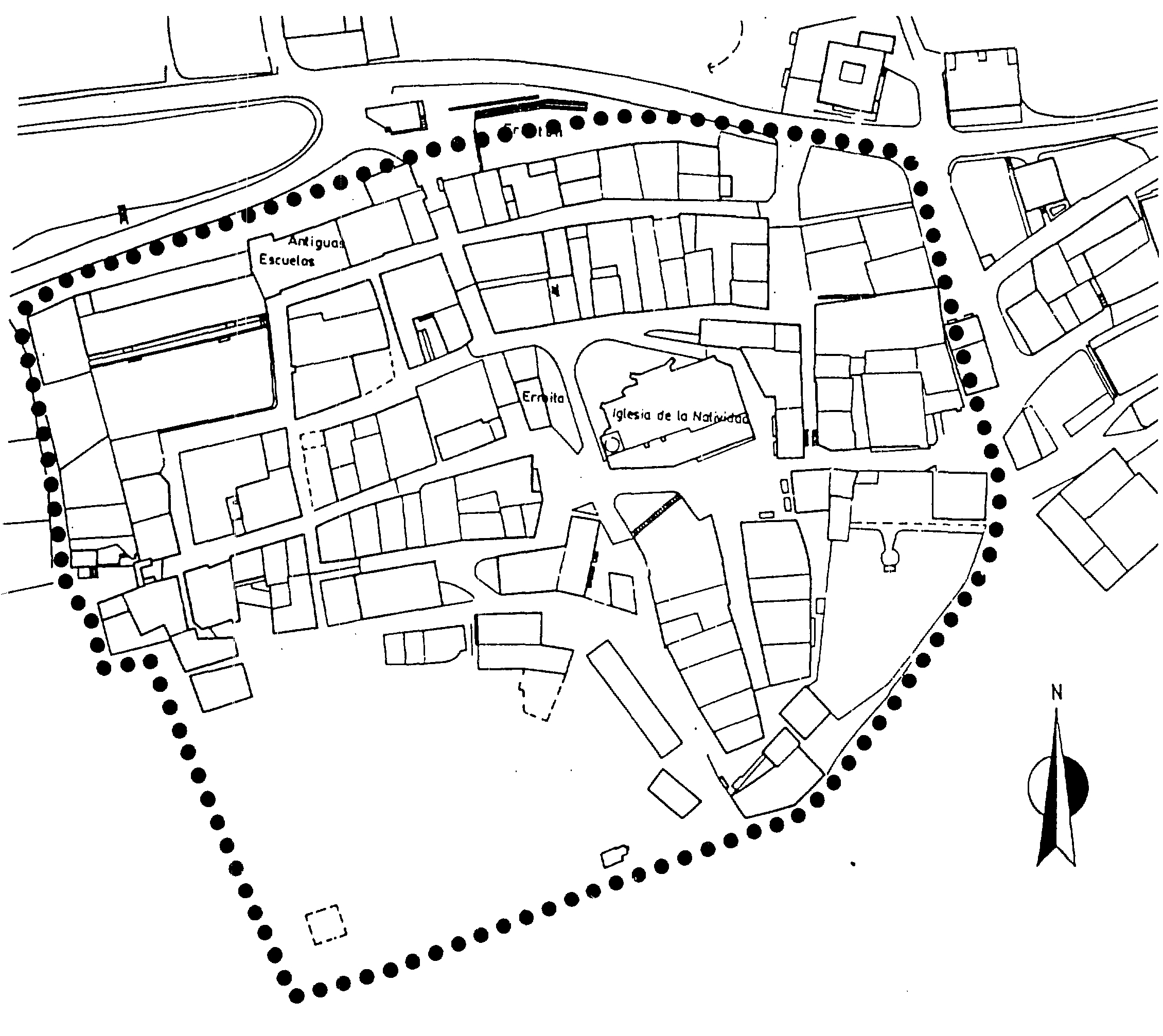 Bernedoko hirigune historikoa